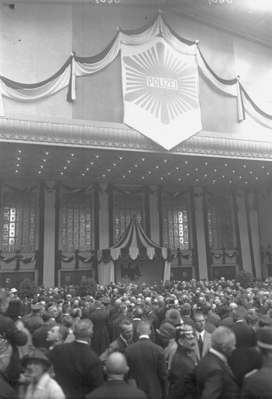 Eröffnung der grossen internationalen Polizeiausstellung in Berlin! wurde am 25. September 1926 durch den preussischen Innenminister Severing eröffnet. Die Ausstellung ist die grösste dieser Art in der Welt. Blick in den Ehrenhof während der Eröffnungsrede des preussischen Innenministers Severing´s.